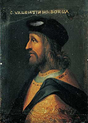 Cesare Borgia